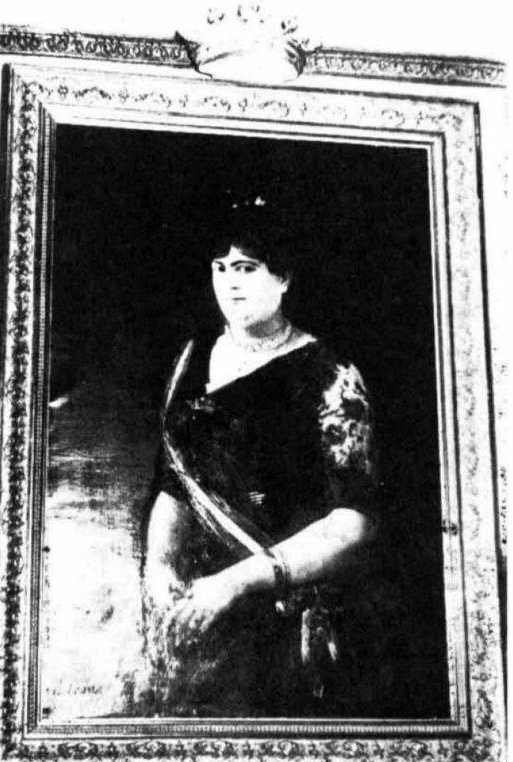 Dª María Dolores Castrillón y Mera. Marquesa Consorte de Francos.